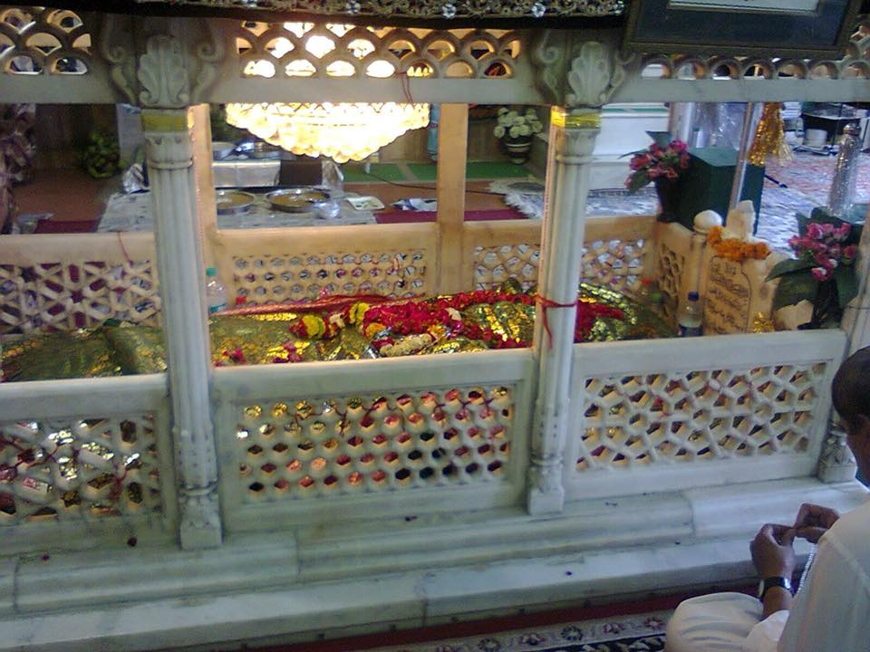 آگرہ میں قاضی سید نور الله شوشتری ؒکا مزار